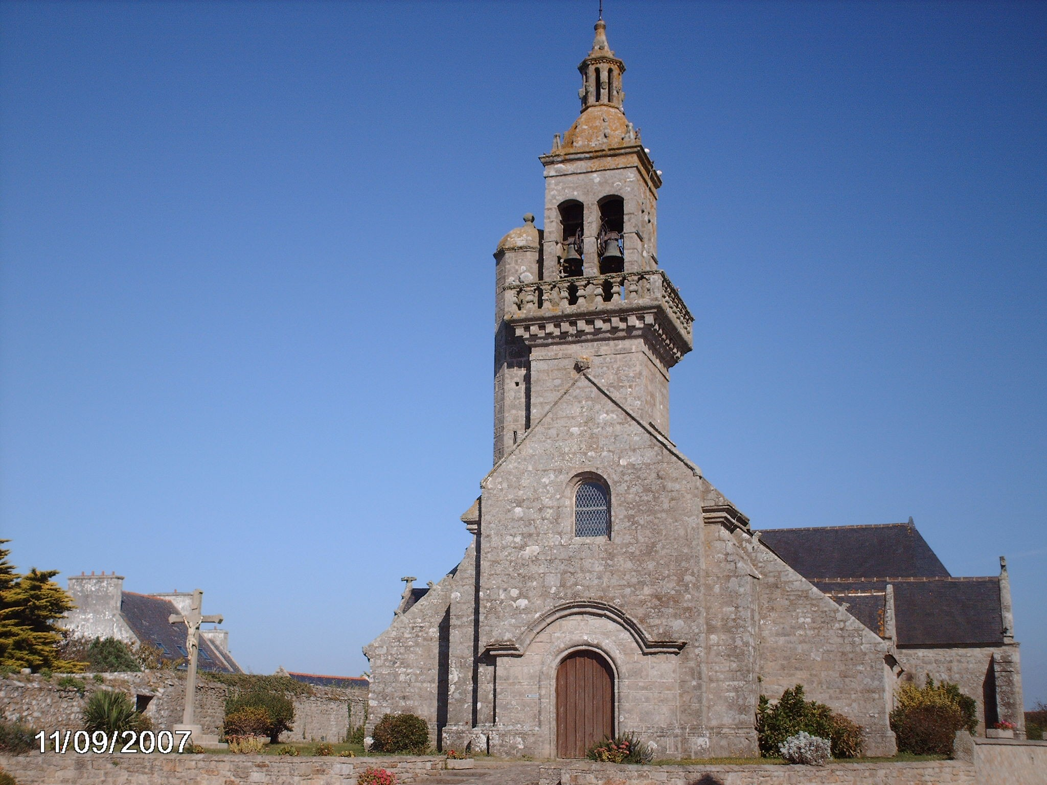 Eglise paroissiale Saint Primel à PRIMELIN (29)